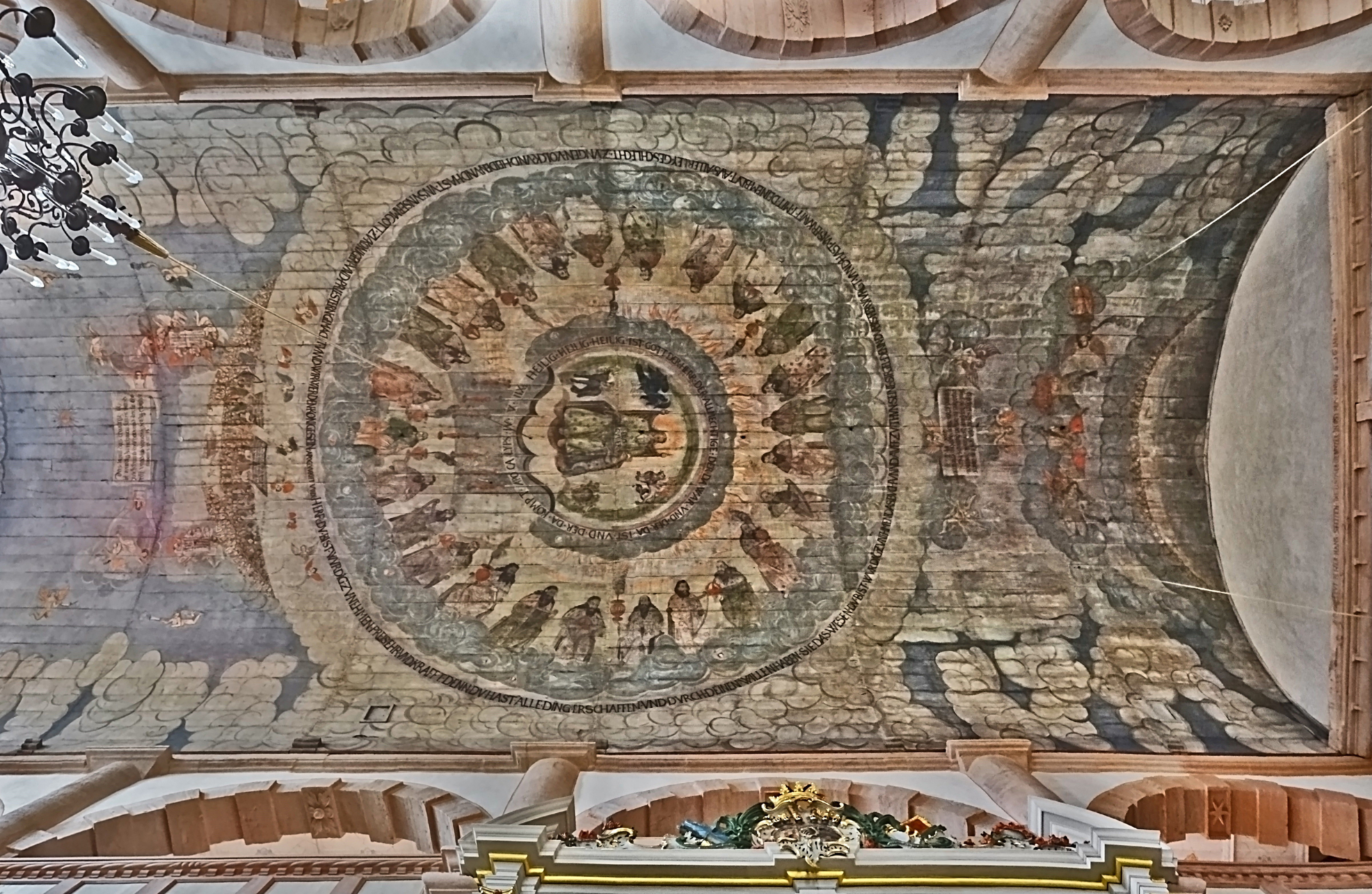 großes Deckengemälde von Nicolaus Storant am Holz-Tonnen-Gewölbe in der Kirchenburg Ostheim vor der Rhön